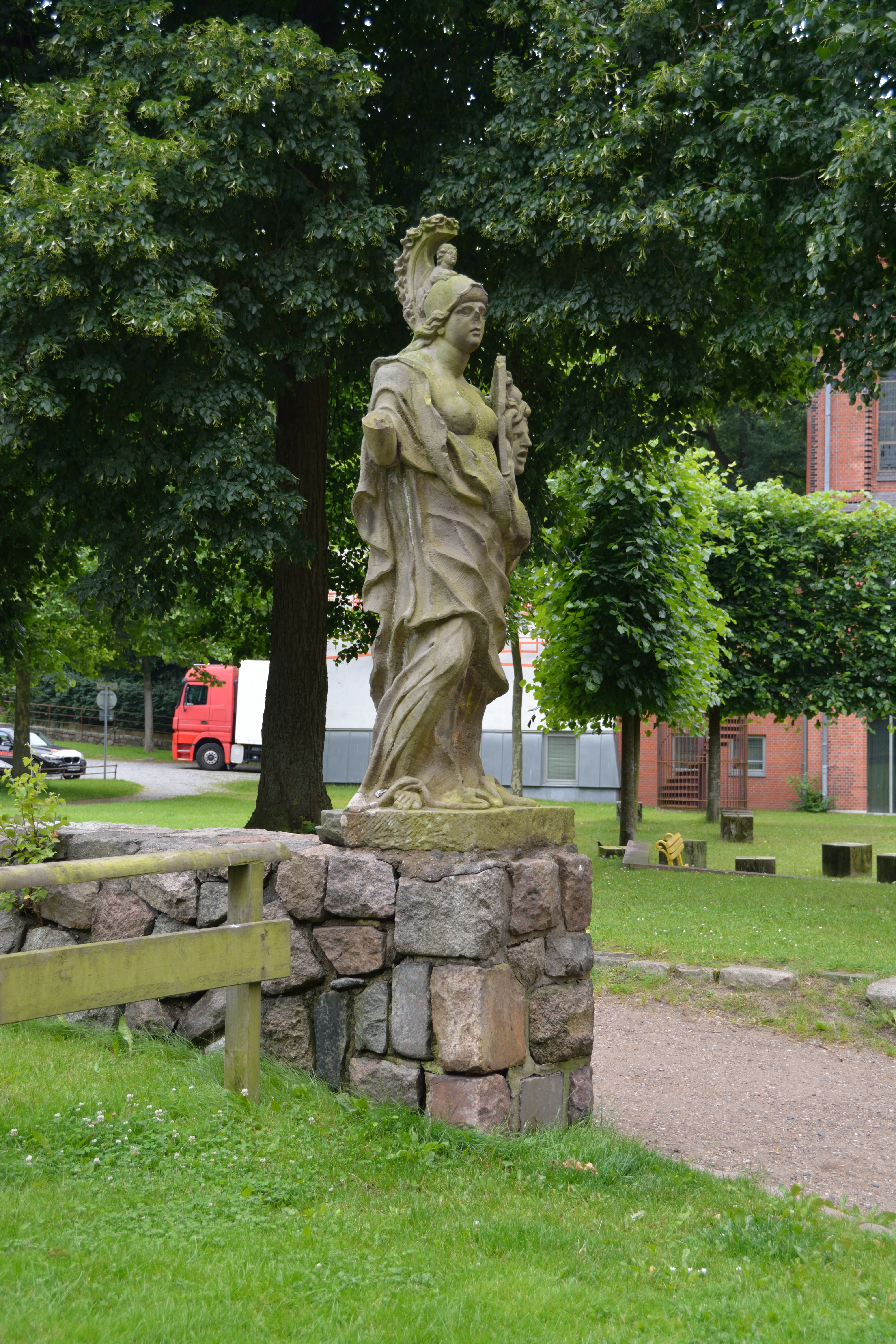 Impressionen vom Museumsberg in Flensburg